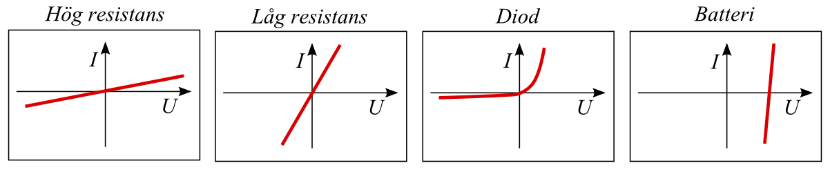 Exemåel på resistanser